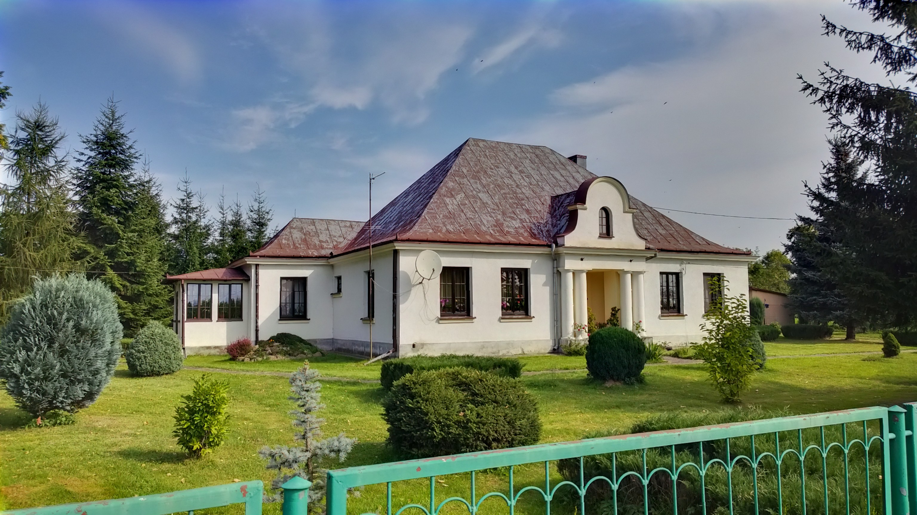 Suchowola - plebania, 1920-1930